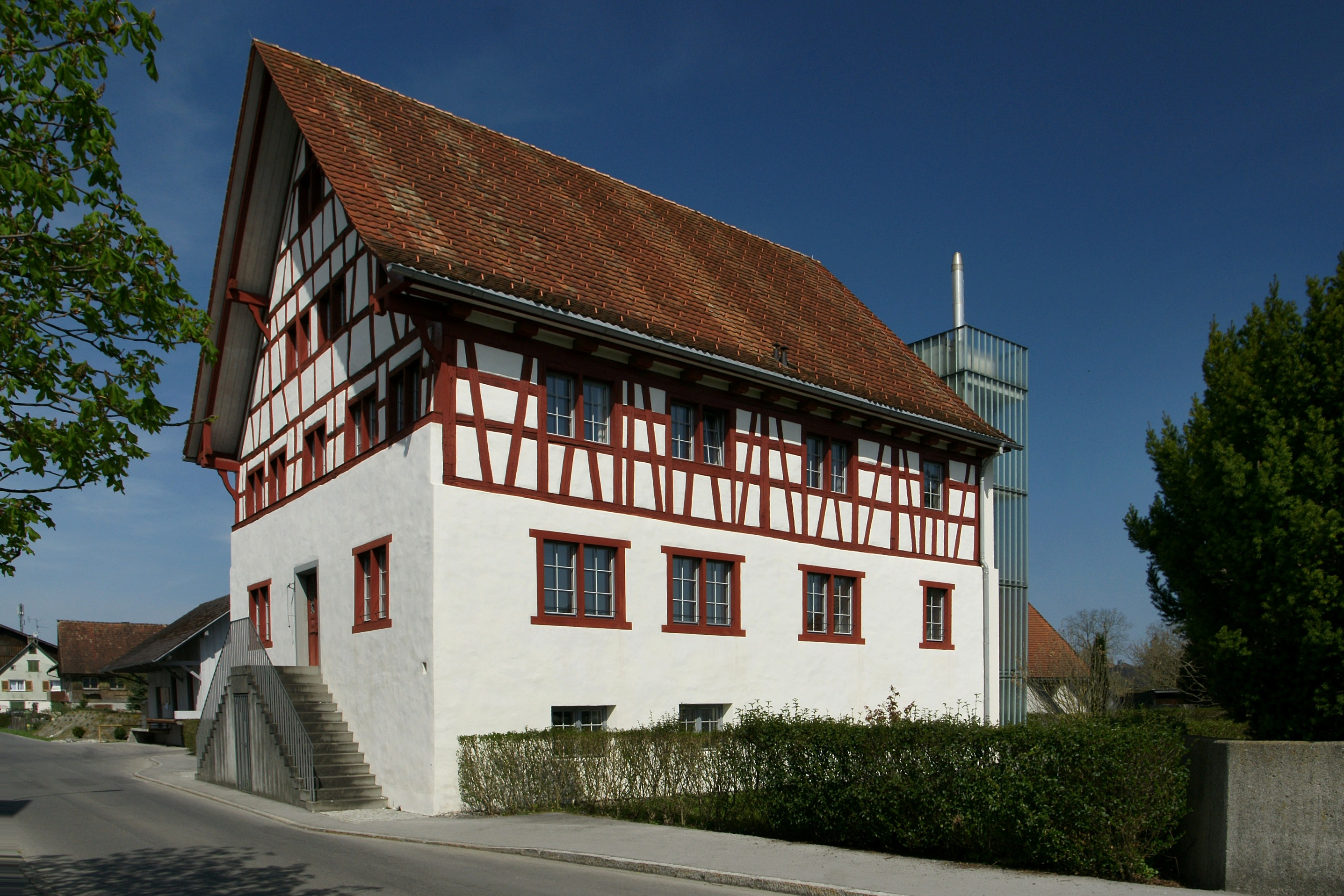 Das Wirtshaus zur Rose, erbaut 1735 von Johannes Lutz im Typus eines stattlichen Thurgauer Fachwerkbaus wird seit 1789 als Pfarrhaus genutzt. Der verglaste Treppen-Liftturm wurde im Zuge einer Generalsanierung in den Jahren 1996/98 nach Plänen von Architekt Wolfgang Ritsch angebaut. Das Haus ist denkmalgeschützt und steht an der Kirchstraße Nr.: 4 in Gaißau.